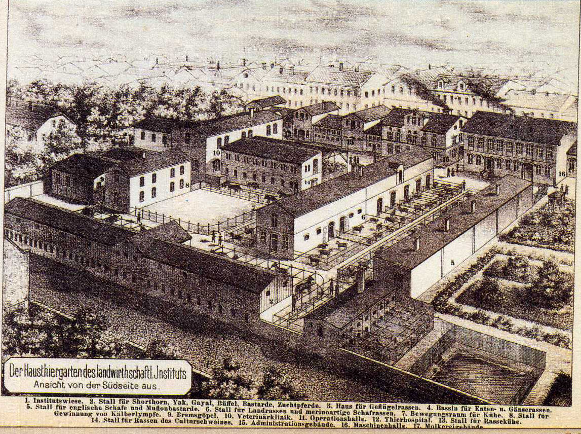 Historische Darstellung des durch Julius Kühn in den Jahren 1865-1888 aufgebauten Haustiergartens des Landwirtschaftlichen Instituts der Universität Halle